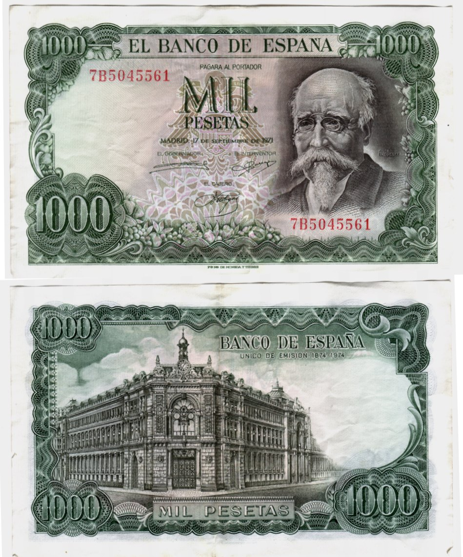 1000 spanische Peseten